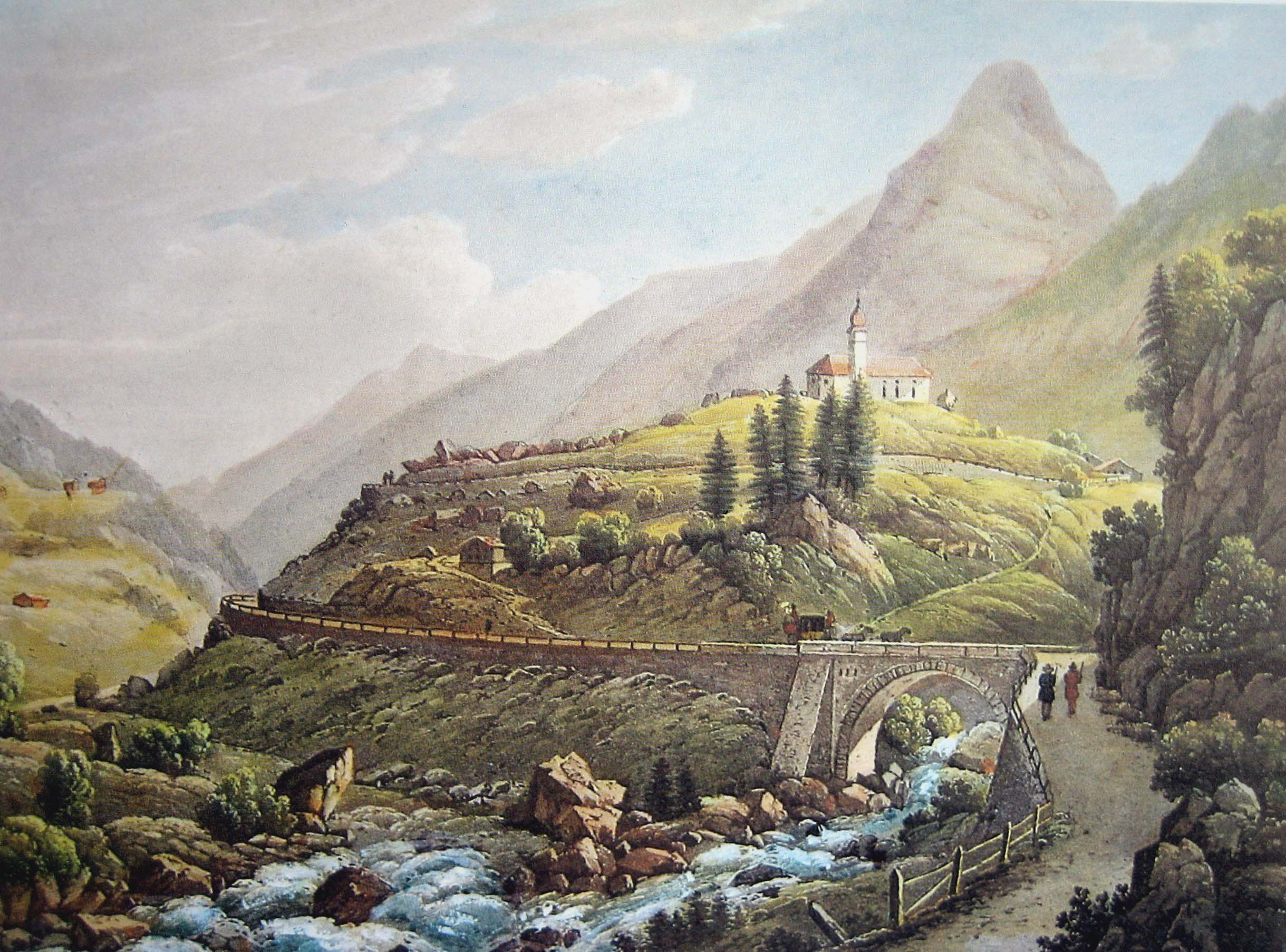 Gotthardpost bei Wassen, 1845, Aquatinta von Weber nach Zeichnung von Straub